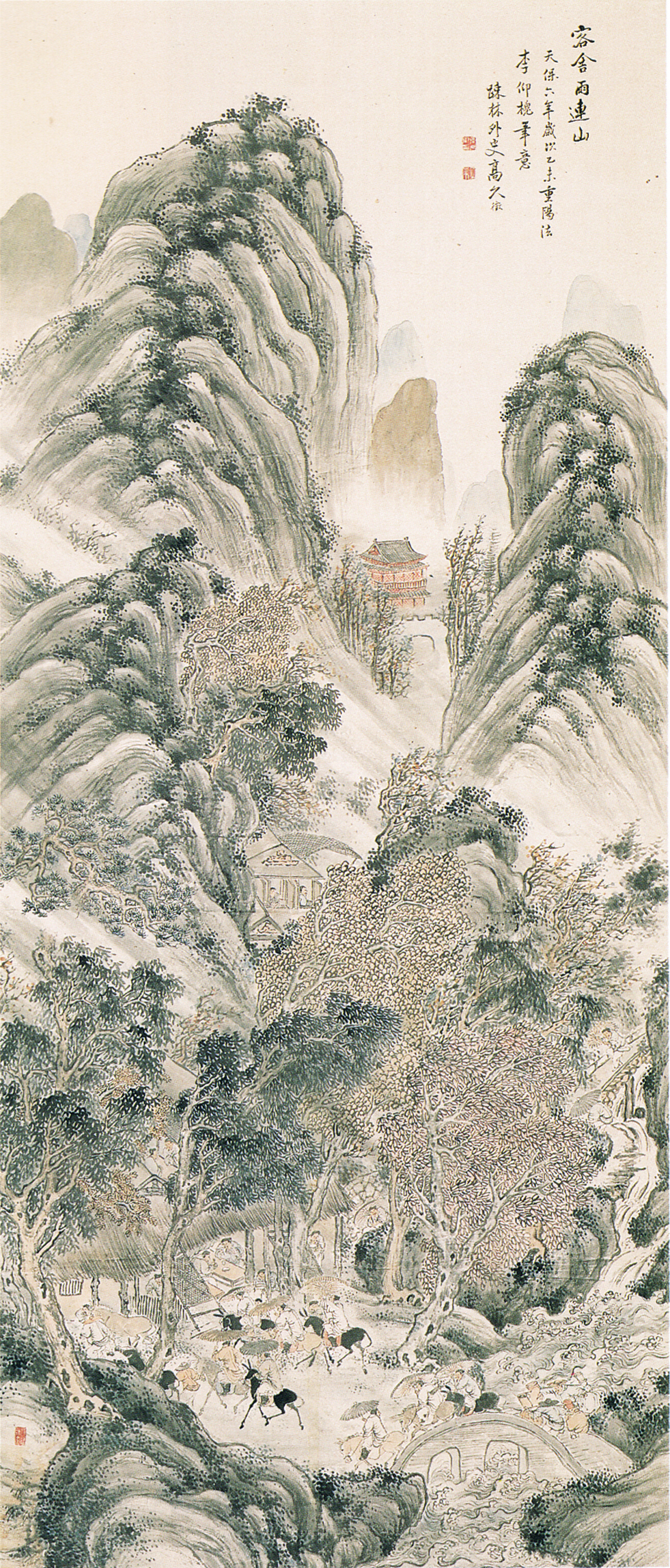 李士達筆驟雨雨行客図模本-高久靄厓 天保6年（1835）